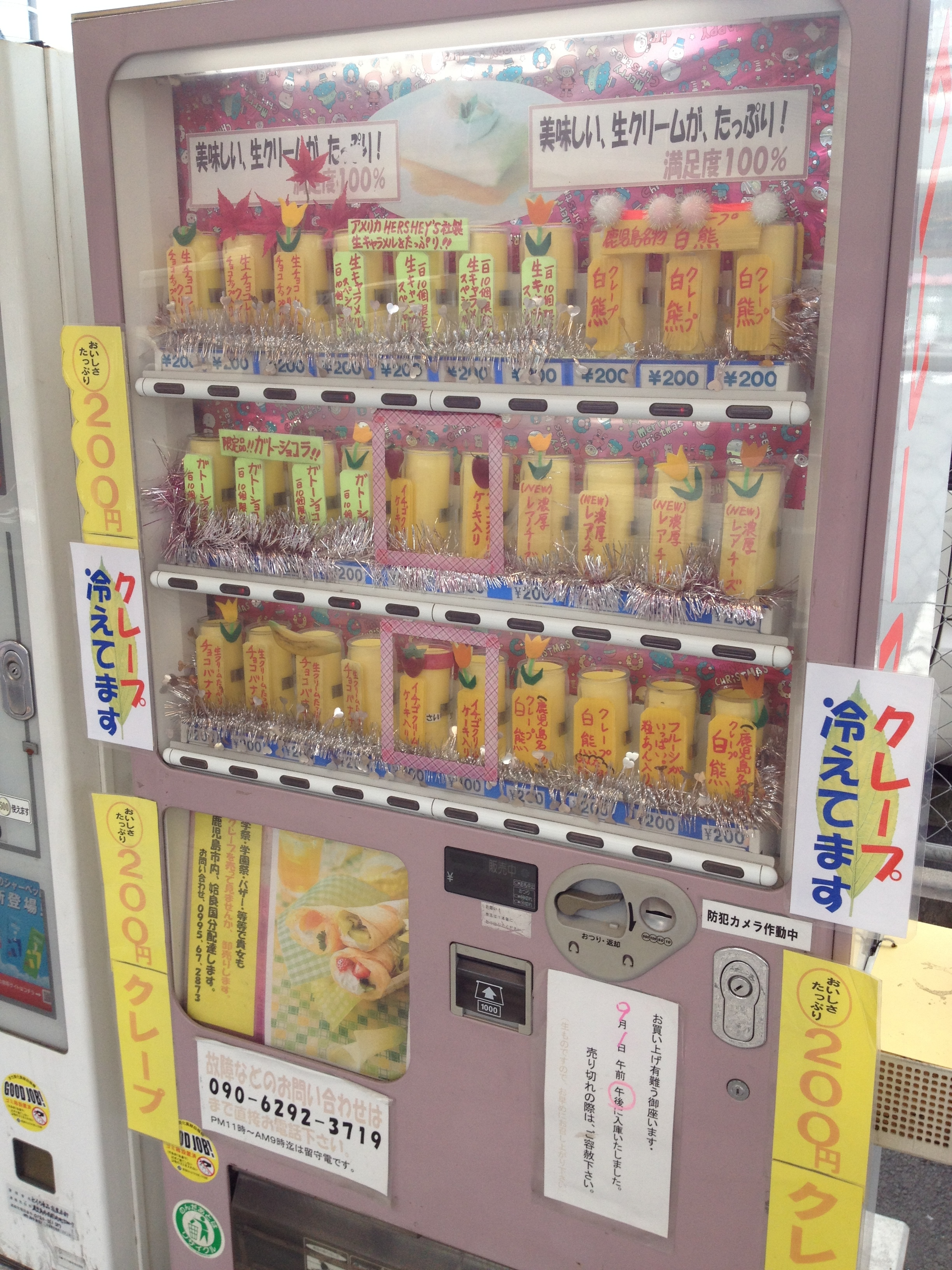 ref